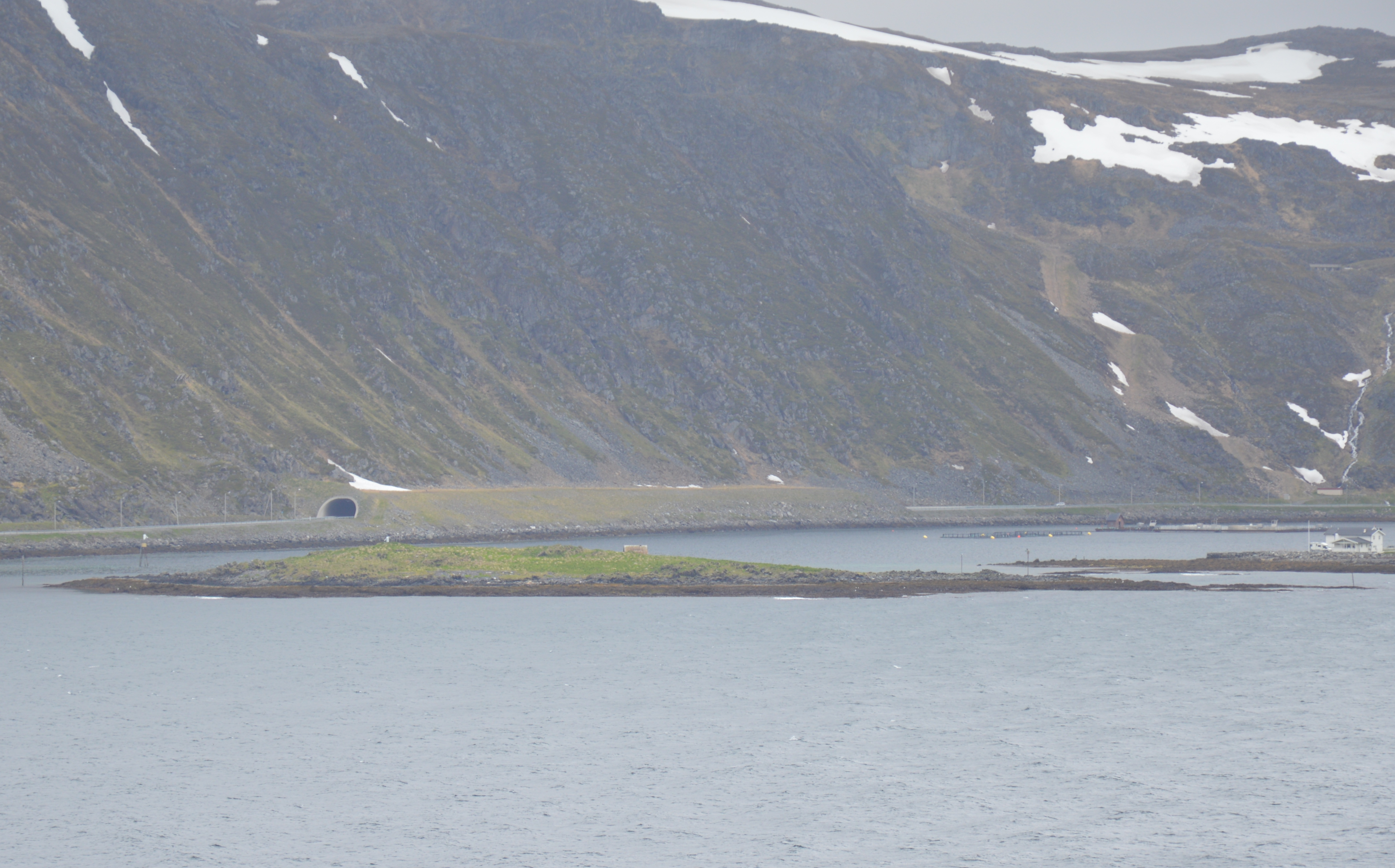 Nordvågholmen